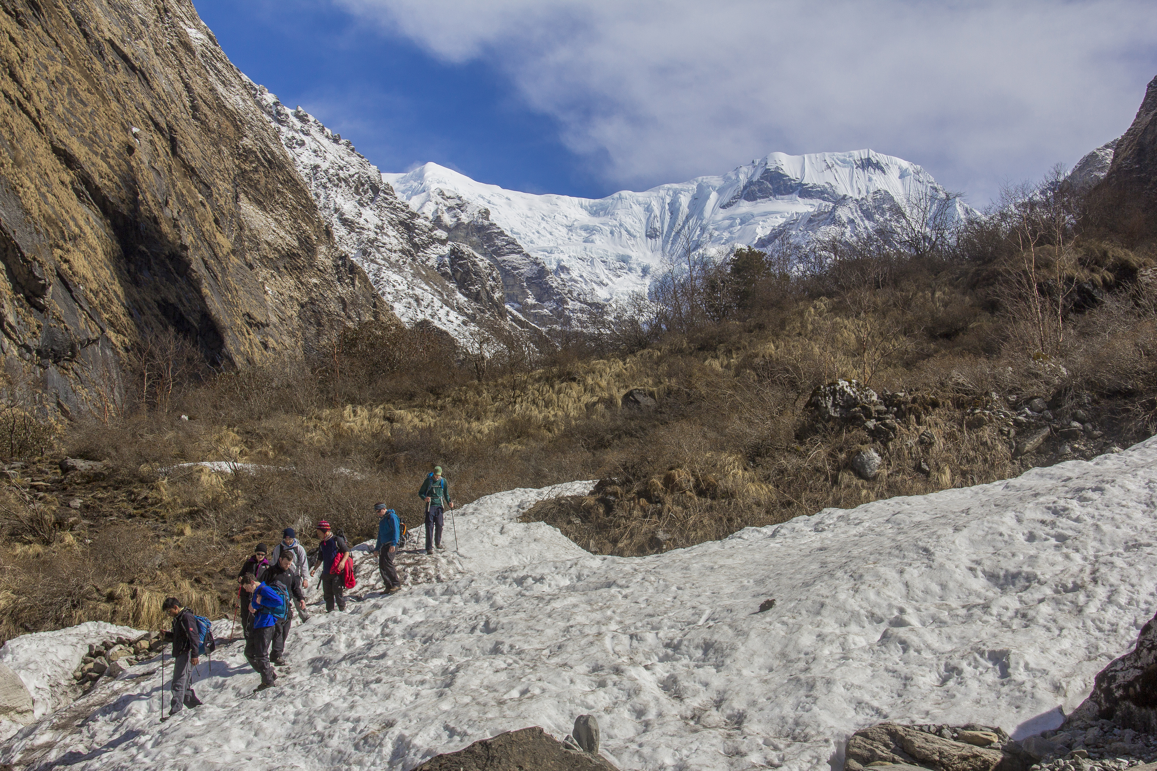 नेपाली: अन्नपुर्ण पदयात्रा सकाएर फर्कँदै गरेका पदयात्रीहरु र पृष्ठभुमिमा मनोरम अन्नपुर्ण हिमशृङ्खला।